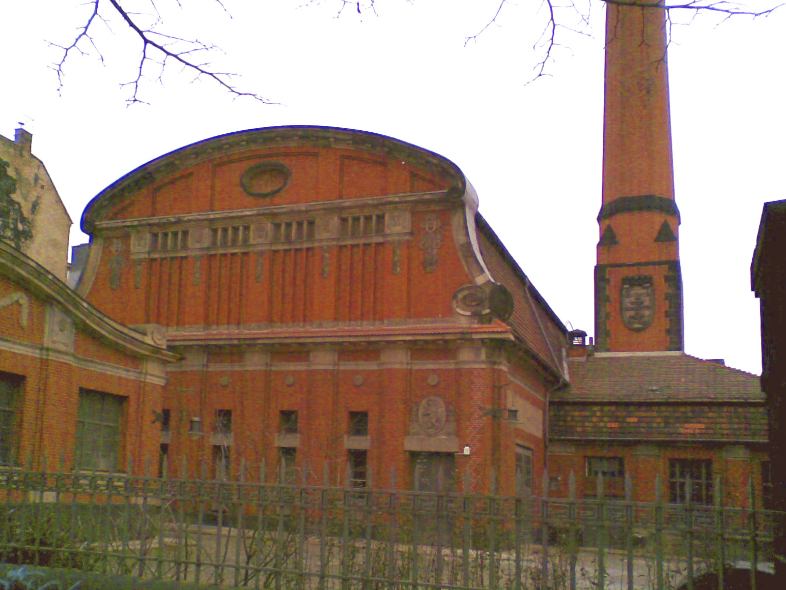 Das Pumpwerk im Radialsystem V (die Dateibezeichnung IX ist nicht korrekt) für Berlin nach dem Plan des Stadtbaudirektors Hobrecht. Im Auftrag des preußischen Innenministeriums sollte ab 1858 eine Planungskommission des Königlichen Polizeipräsidiums Pläne schaffen, die der erwarteten Situation gerecht werden. Dafür war die Polizei zuständig, zu dieser Zeit als Baupolizei auch für die Stadt- und Infrastrukturplanung und wichtige Bauaufgaben. Vorsitzender der Kommission war der junge Regierungsbaumeister James Hobrecht, der jüngere Bruder des Reichstagsabgeordneten und späteren Oberbürgermeisters der Stadt Arthur Johnson Hobrecht.